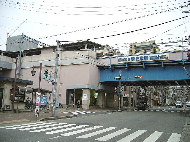 新在家駅